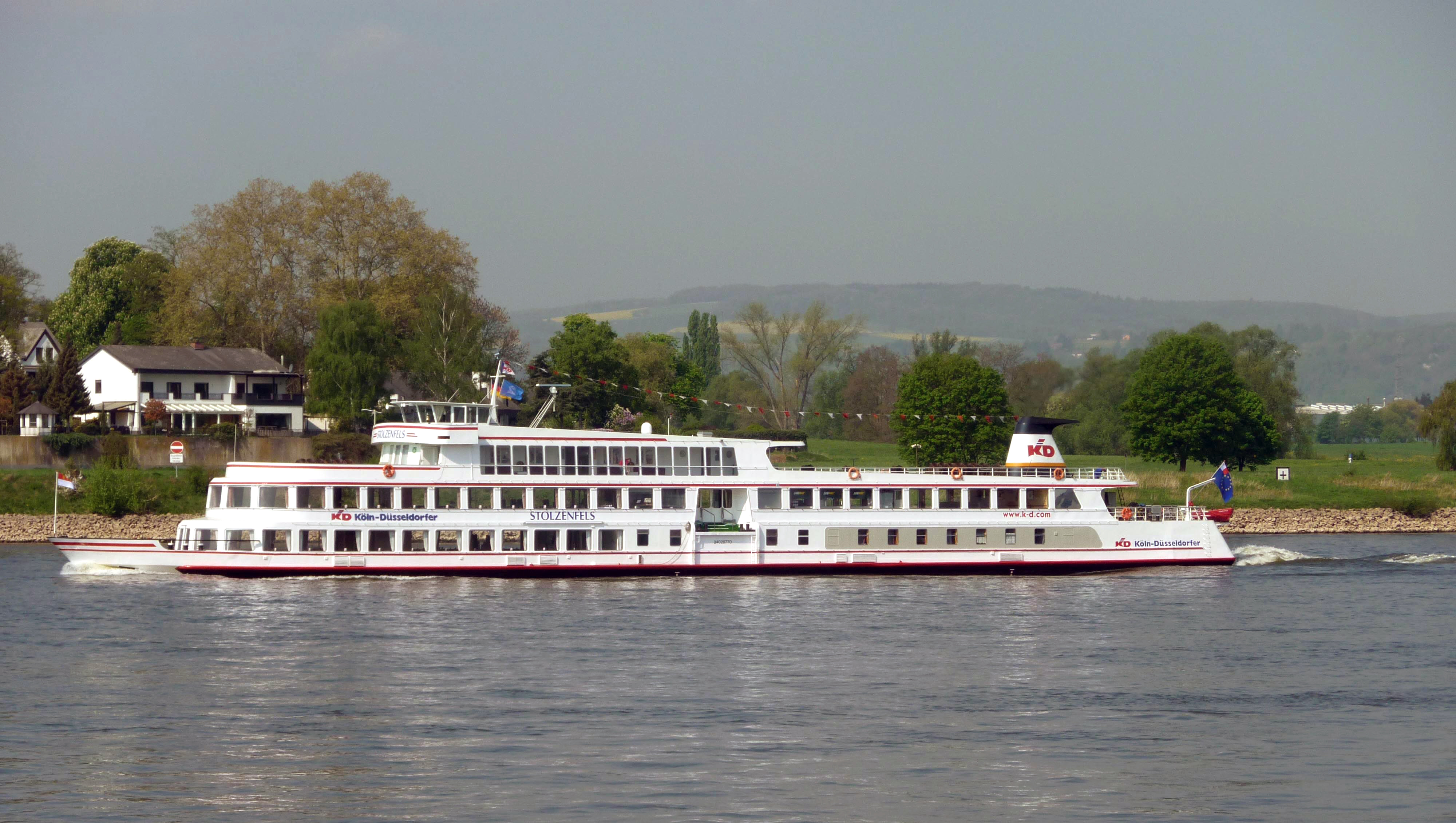 KD-Motorschiff Stolzenfels